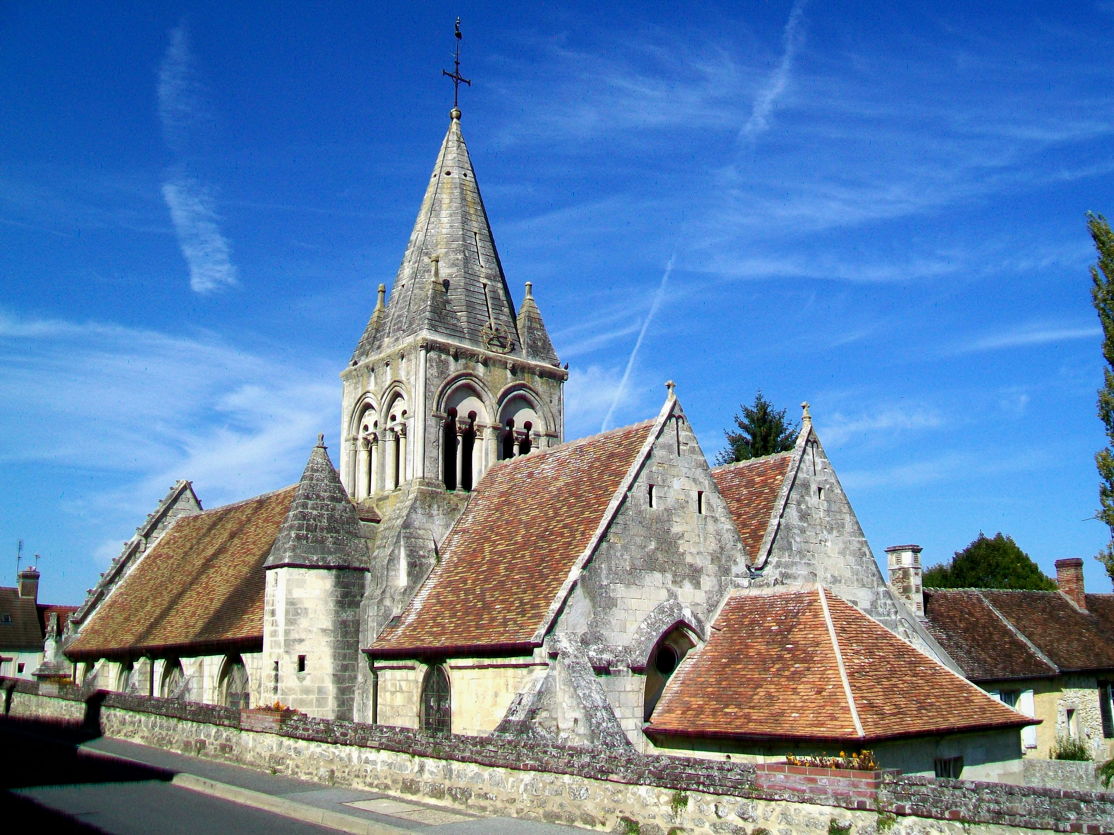 L'église Saint-Denis, Saint-Jean-Baptiste depuis l'est.